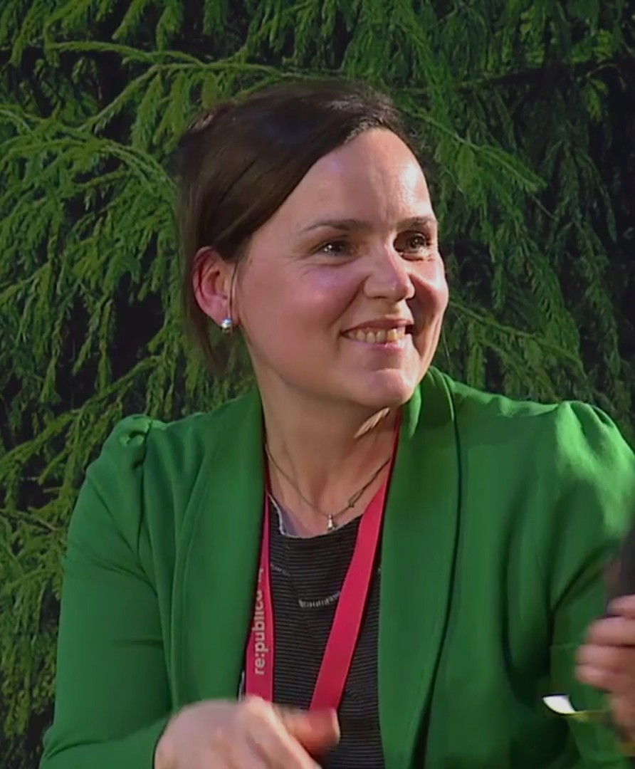 Find out more at: Auch wenn "das Internet" heute weit verbreitet ist und viele Zugangsbarrieren wegfallen gibt es nach wie vor Menschen, die einzelne Dienste oder das Netz insgesamt nicht nutzen. Dabei spielen nicht nur Faktoren wie Alter oder Bildung eine Rolle: Es geht auch um die ganz bewusste Entscheidung zur Nichtnutzung -- über deren Ursachen und Folgen sollten wir mehr forschen und vor allem reden. Ulrike Roth Nele Heise Juliane Kirchner Cindy Roitsch Wiebke Loosen Creative Commons Attribution-ShareAlike 3.0 Germany (CC BY-SA 3.0 DE)